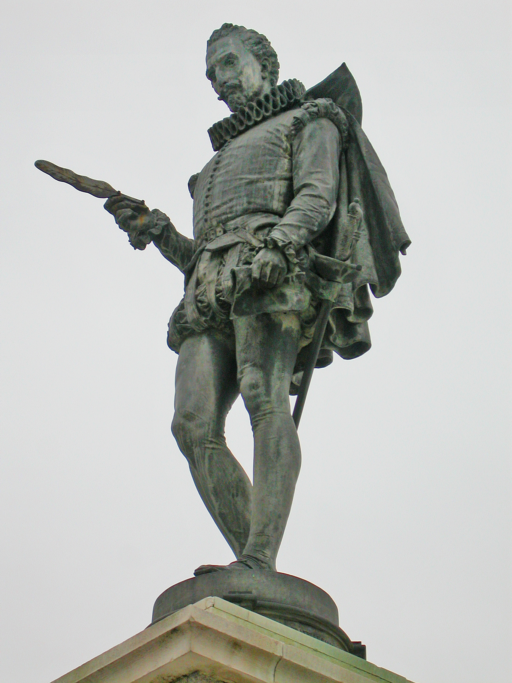 Estatua de Cervantes - Plaza Cervantes en Alcalá de Henares, Madrid